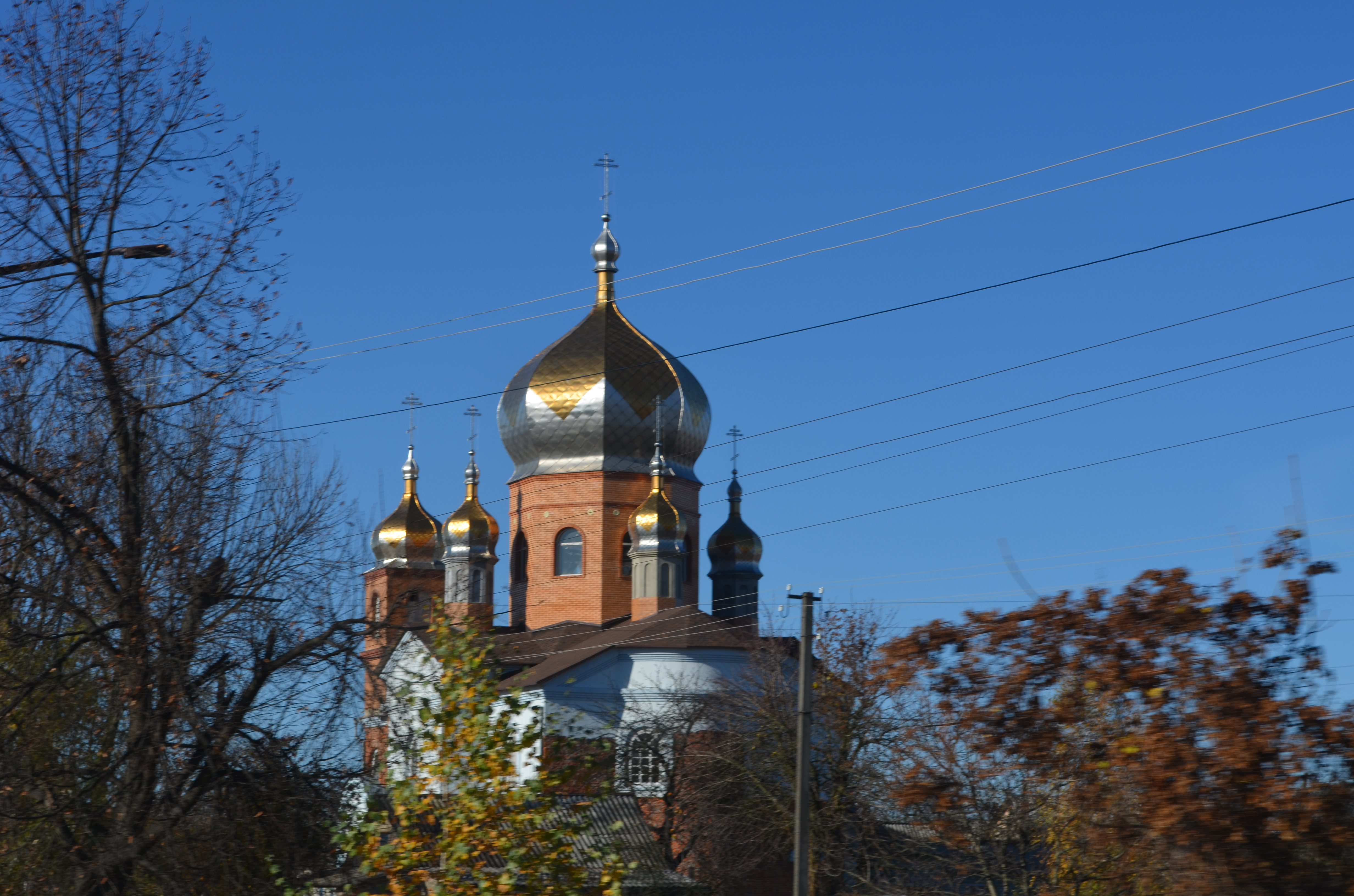 Церква в Коростені